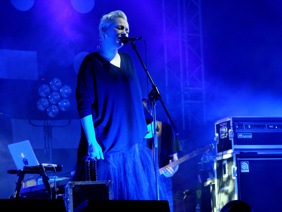 Kasia Nosowska - polska wokalistka z zespołu Hey